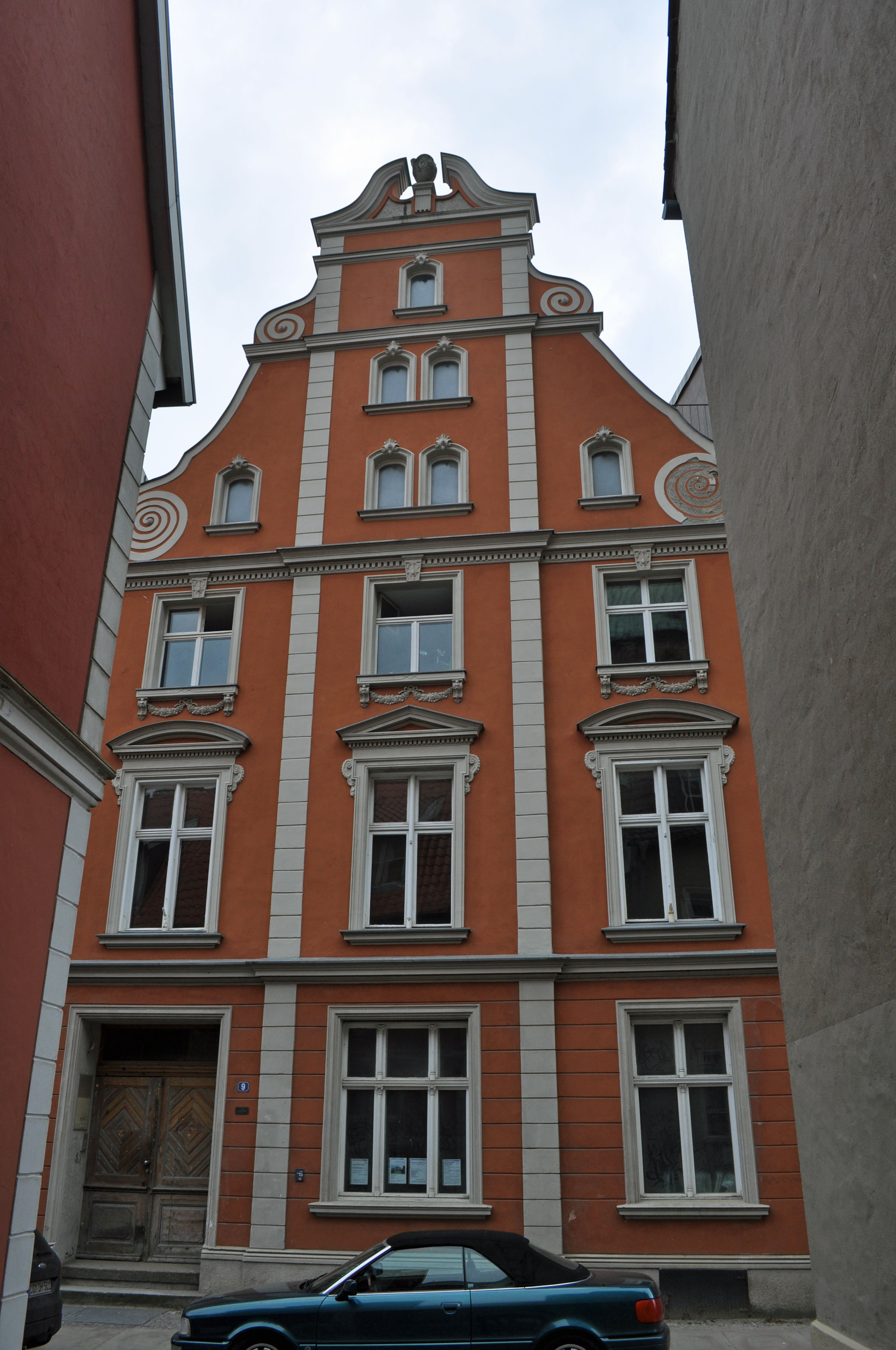 Gebäude bzw. Gebäudedetail in Stralsund. Straße und Hausnummer siehe Dateiname.